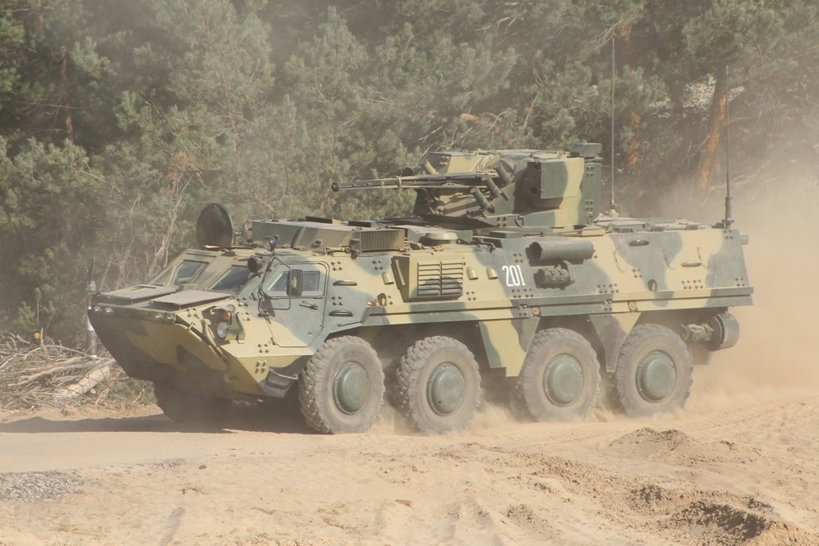 На Гончарівському загальновійськовому полігоні завершилися навчальні збори з особовим складом оперативного резерву, який було залучено до проведення тактичних навчань однієї з механізованих бригад. 620 резервістів відпрацювати дії бригади у обороні та наступі із бойовою стрільбою та залученням авіації. Два тижні військовослужбовці вдосконалювали свої навички та набували нового досвіду, або опановували нові військові спеціальності та новітні зразки озброєнні і військової техніки. Варто зазначити, що резервісти не тільки поповнювали свій багаж знань та вмінь, а й ділилися власним досвідом, адже переважна більшість резервістів має унікальний бойовий досвід, набутий у зоні проведення антитерористичної операції. Із завершенням зборів резервістів привітав начальник штабу – заступник командувача військ оперативного командування «Схід» генерал-майор Олександр Красноок, який здійснював загальне керівництво бригадними тактичними навчаннями. Він подякував резервістам за проведену роботу у складі механізованої бригади та вручив особовому складу бригади відзнаки, цінні подарунки та подяки начальника Генерального штабу, командування Сухопутних військ та оперативного командування «Схід». Всі 620 резервістів вже сьогодні відправляться додому. Фото Євген Романов